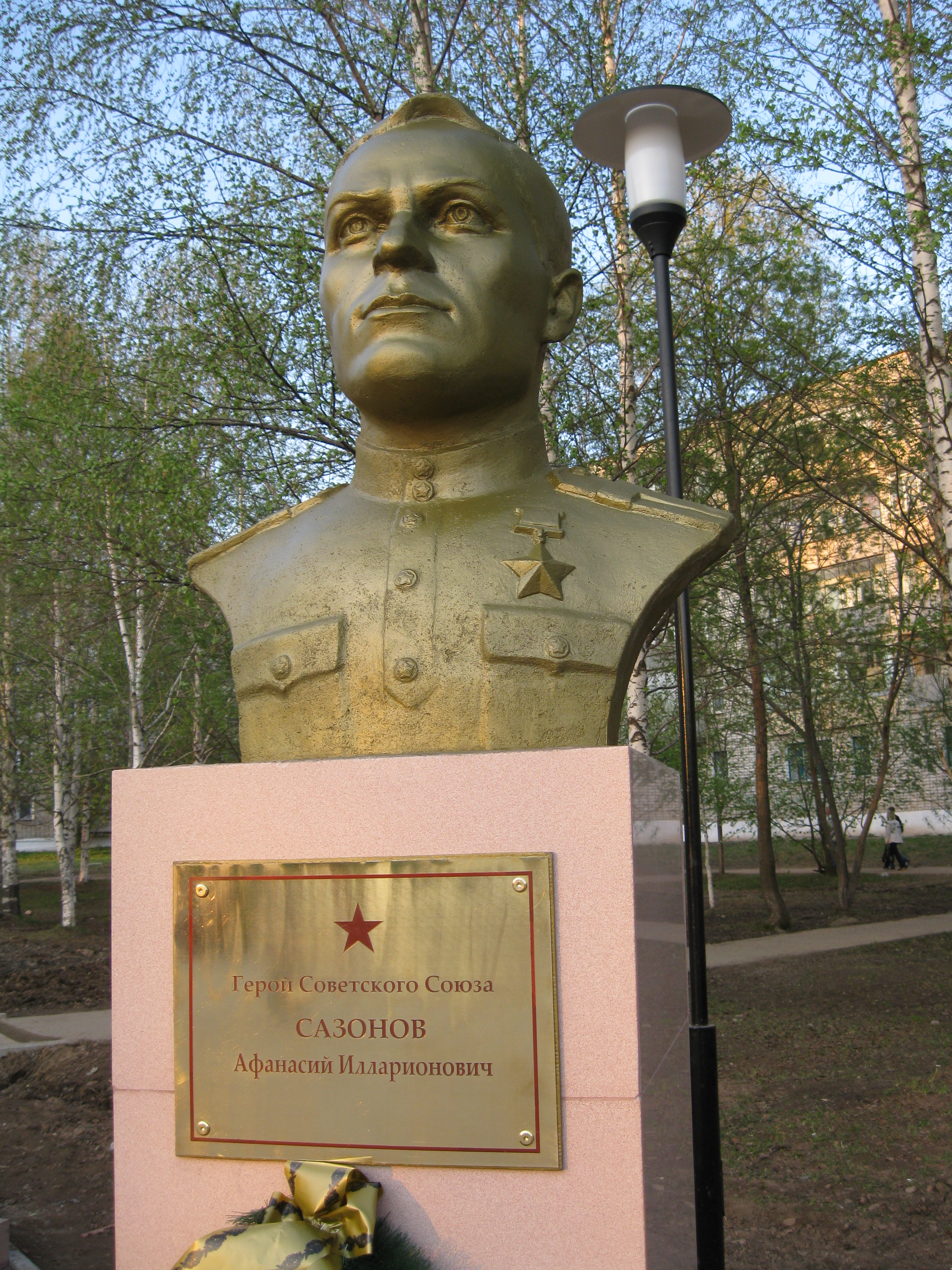 Бюст Афанасия Илларионовича Сазонова на Аллее Славы, открытой 09.05.2010 года в городе Чернушка.